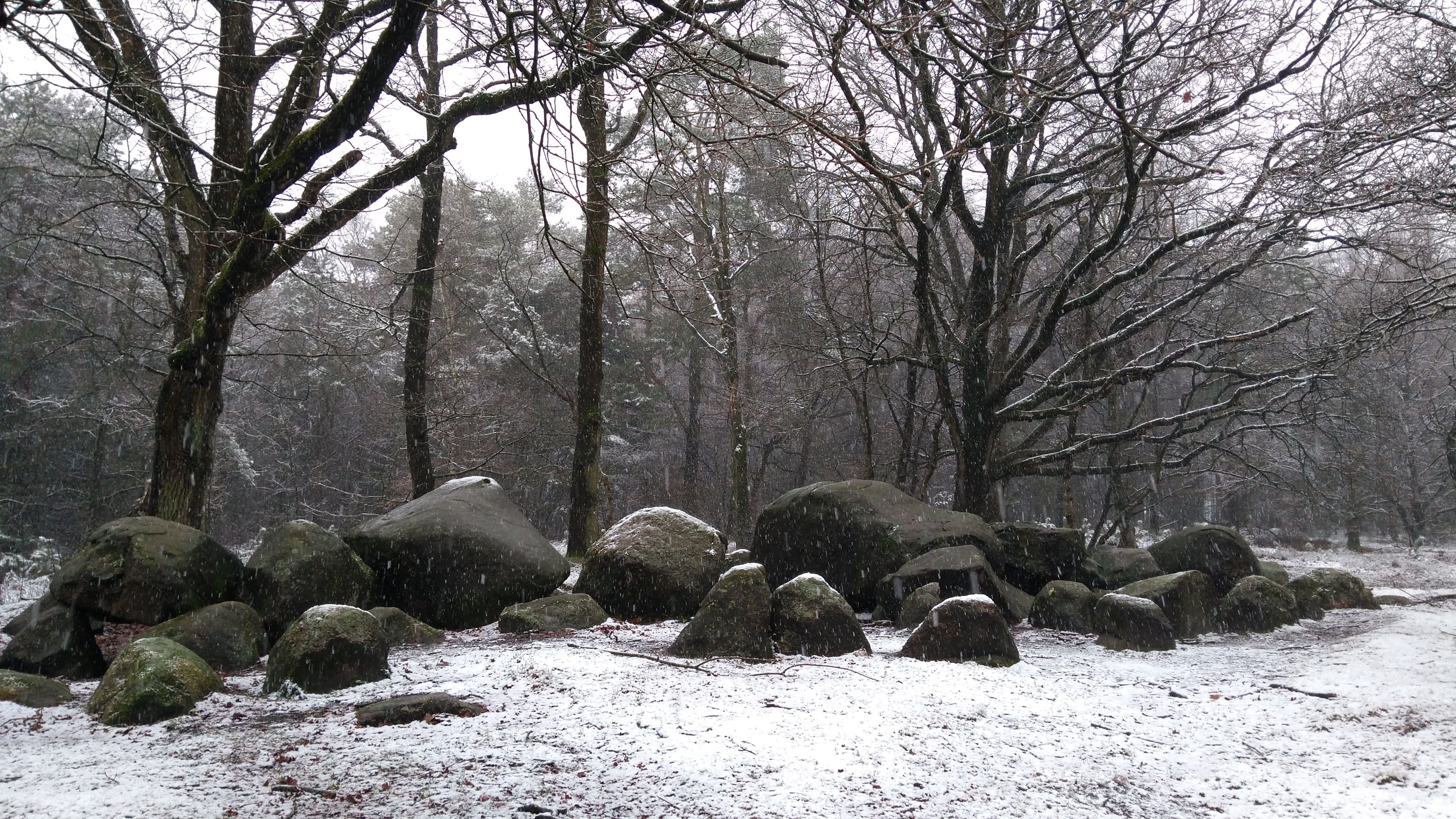 Großsteingrab Sprokhoff Nr. 860